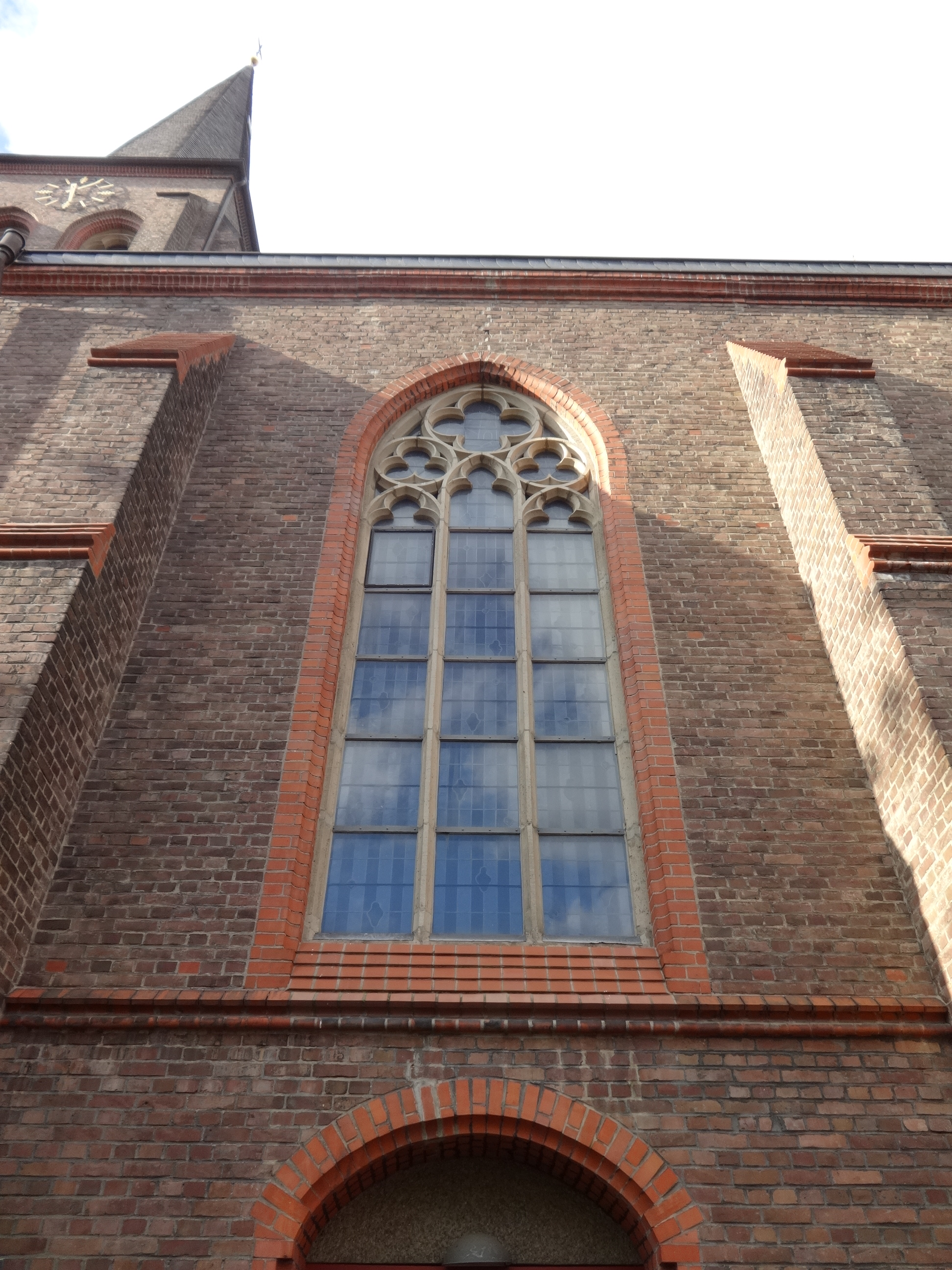 Die neugotische Hallenkirche St. Servatius in Brühl-Kierberg (Rheinland) entstand in den Jahren 1903 bis 1904 nach Plänen des Architekten Alfred Tepe. Sie ersetzte einen Vorgängerbau aus dem 14. Jahrhundert. Neben den neugotischen Fenstern ist insbesondere ein Altar aus dem 17. Jahrhundert sehenswert, der den Aposteln Matthias und Jakobus gewidmet ist. Ein Volksaltar stammt vom Sürther Bildhauer Theo Heiermann.